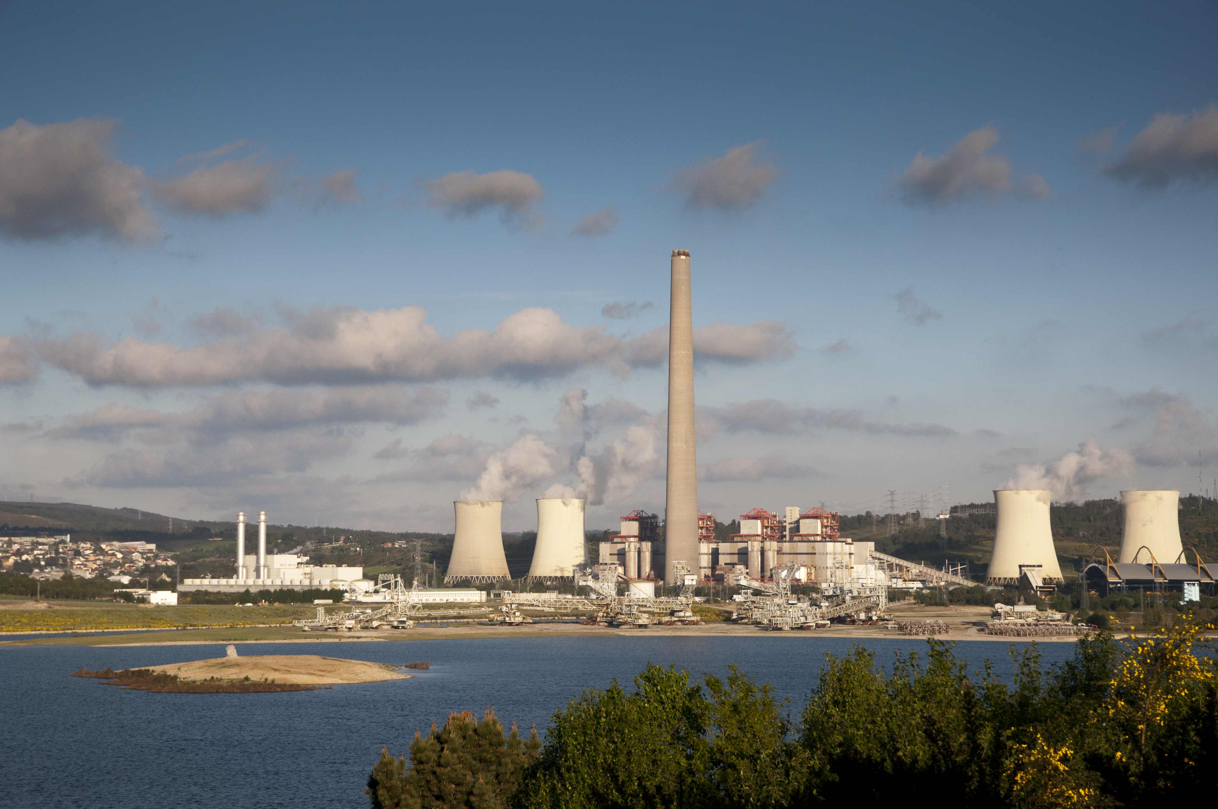 Central térmica das Pontes e Lago das Pontes